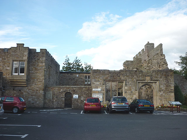 Car park and ruins, Blenkinsopp Castle